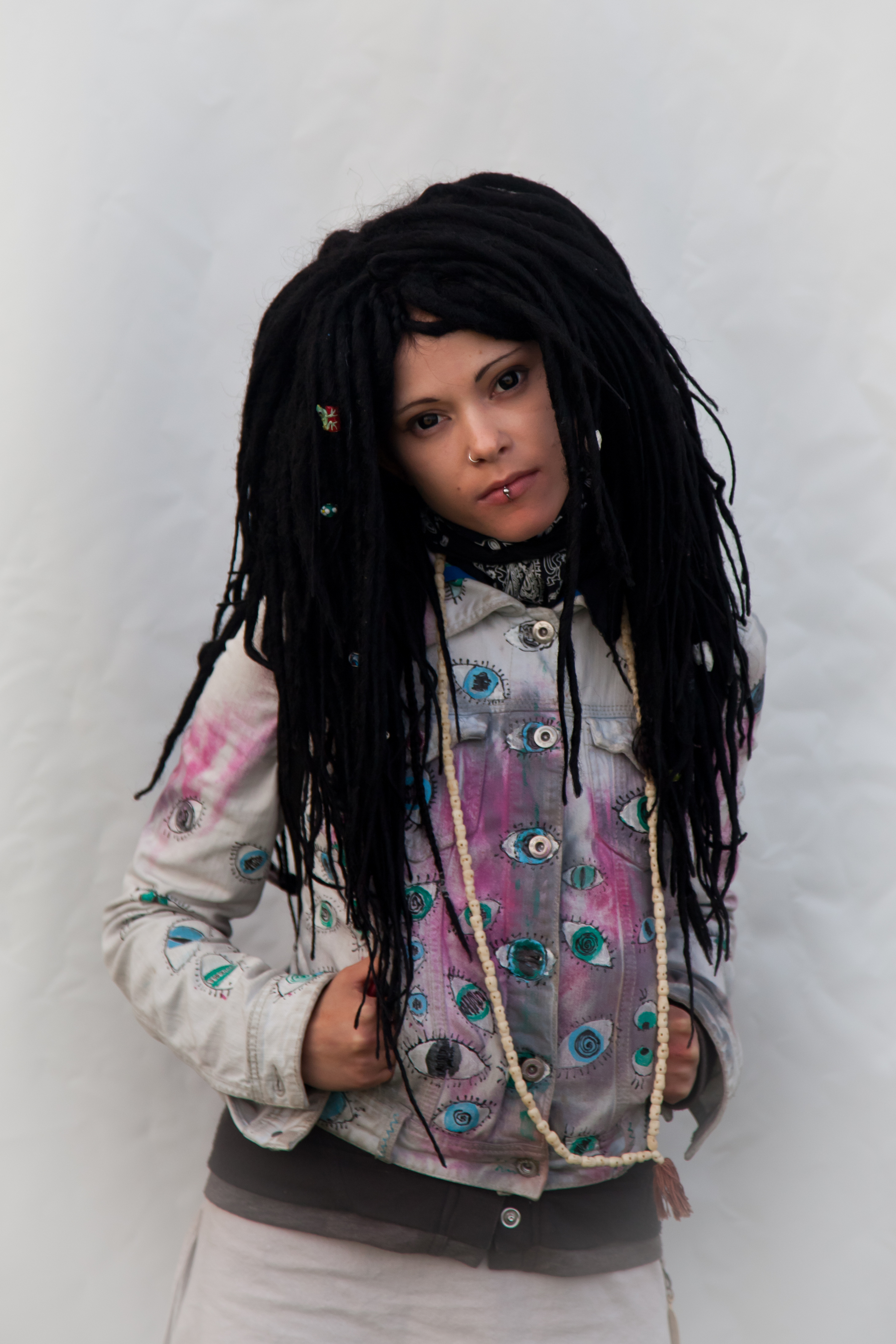 Да́рия Арка́дьевна Ставро́вич («Nookie») — российская певица, вокалистка группы «Слот» на «рок-фестивале Остров» (о. Краснофлотский, Архангельск). Организатор фестиваля — концертное агентство «ORLANDINA».